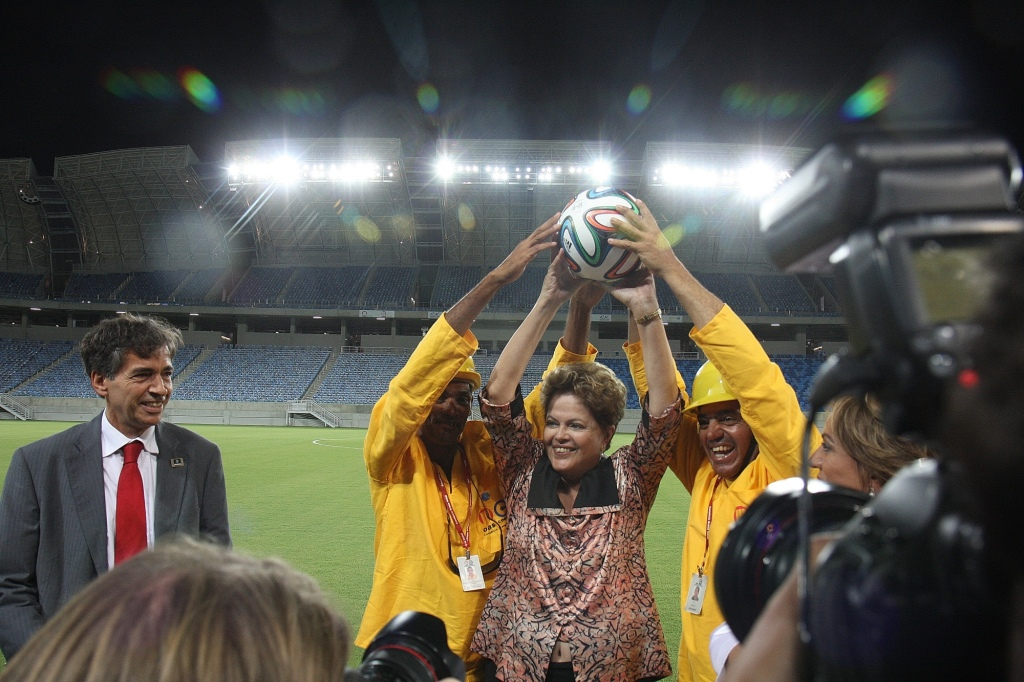 Presidente Dilma Rousseff inaugurando a Arena das Dunas, em 22 de janeiro de 2014, em Natal, Brasil.